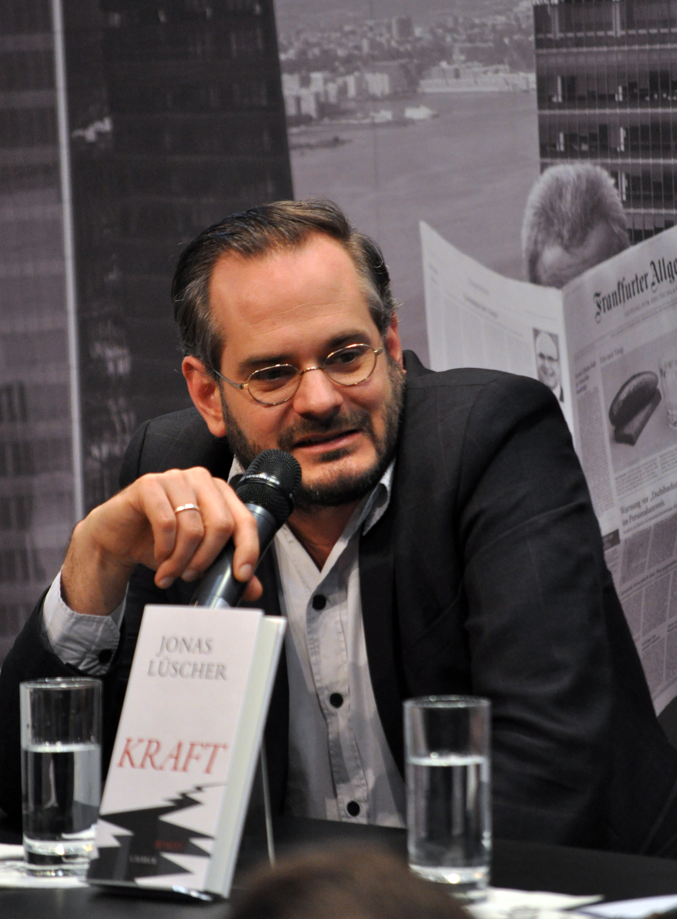 Jonas Lüscher auf der Leipziger Buchmesse 2017